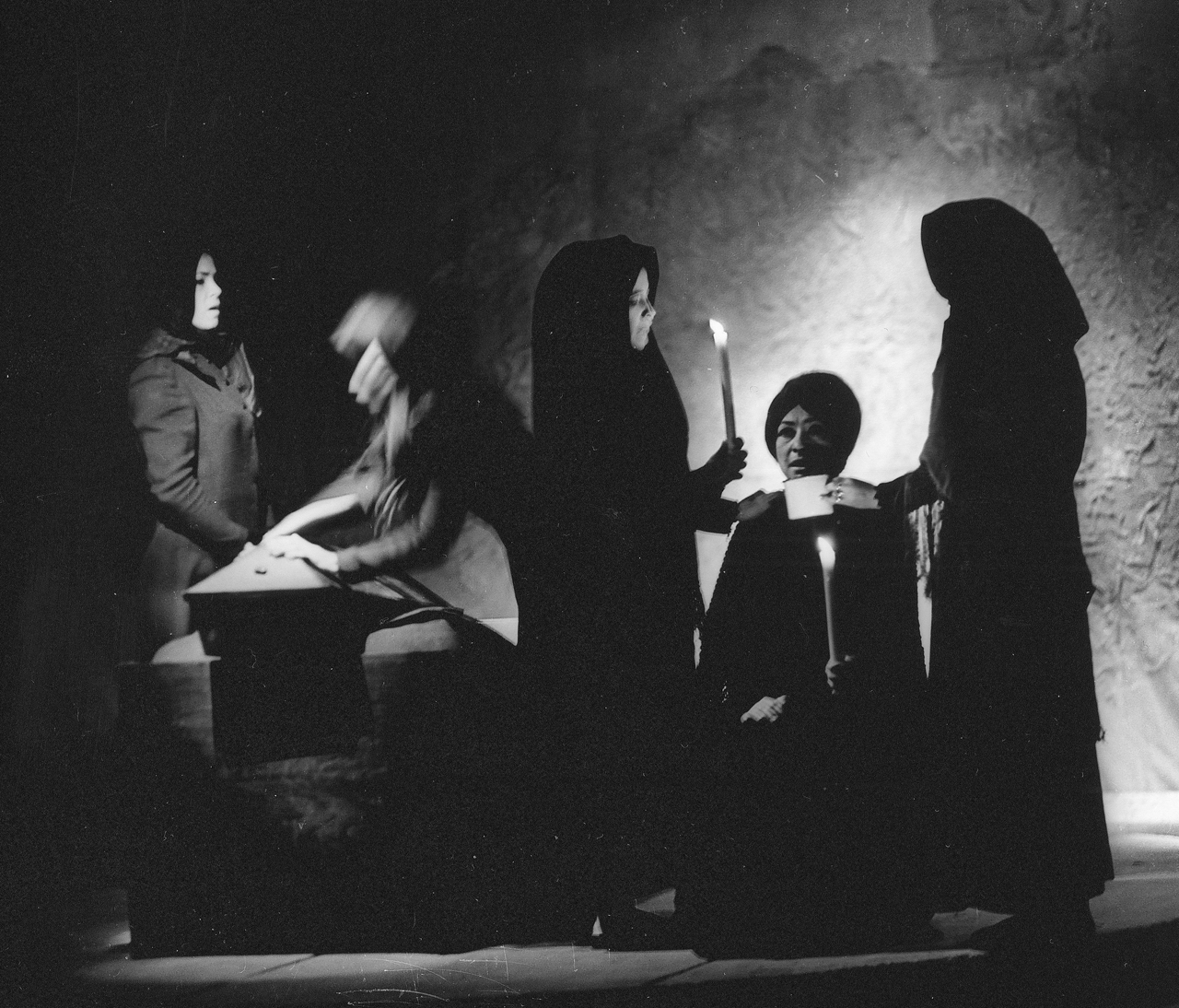 Jelenet a Gyász című előadásból (a képen Berek Kati is látható). Budapest, 25. Színház.